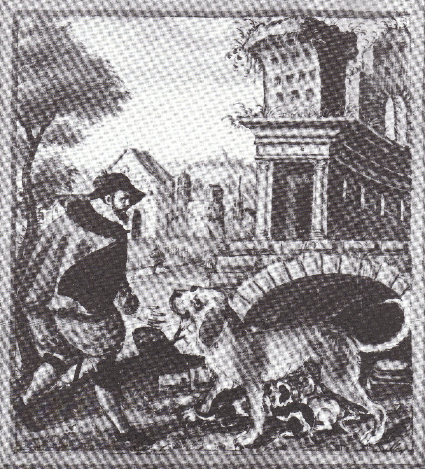 Aquarell aus Cod. cam. fol. 3 der WLB Stuttgart: Johann Wolffs Übersetzung von Jacob von Fouillaux: Von der Jagd